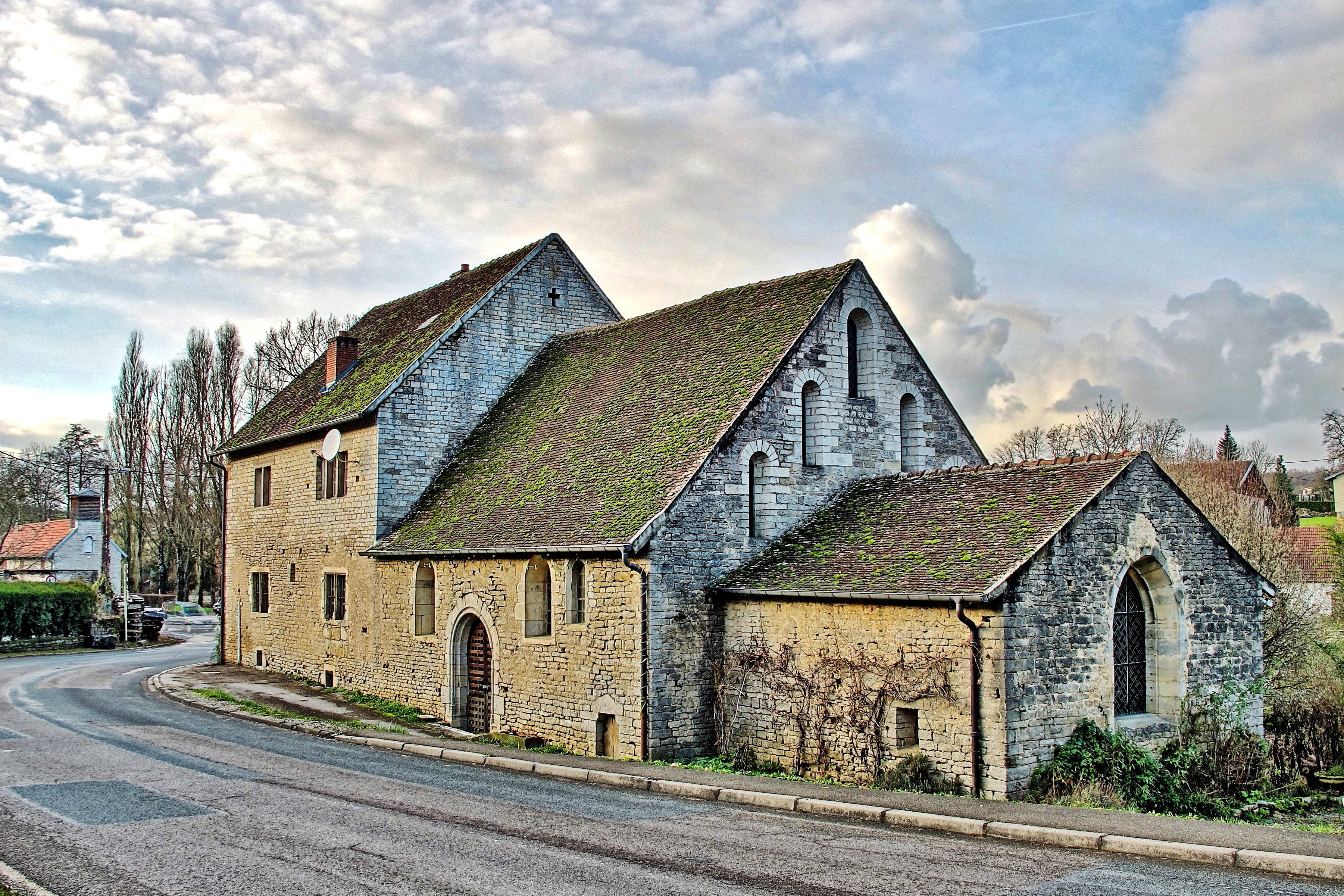 Inscrit aux monuments historiques sous le numéro : PA25000007